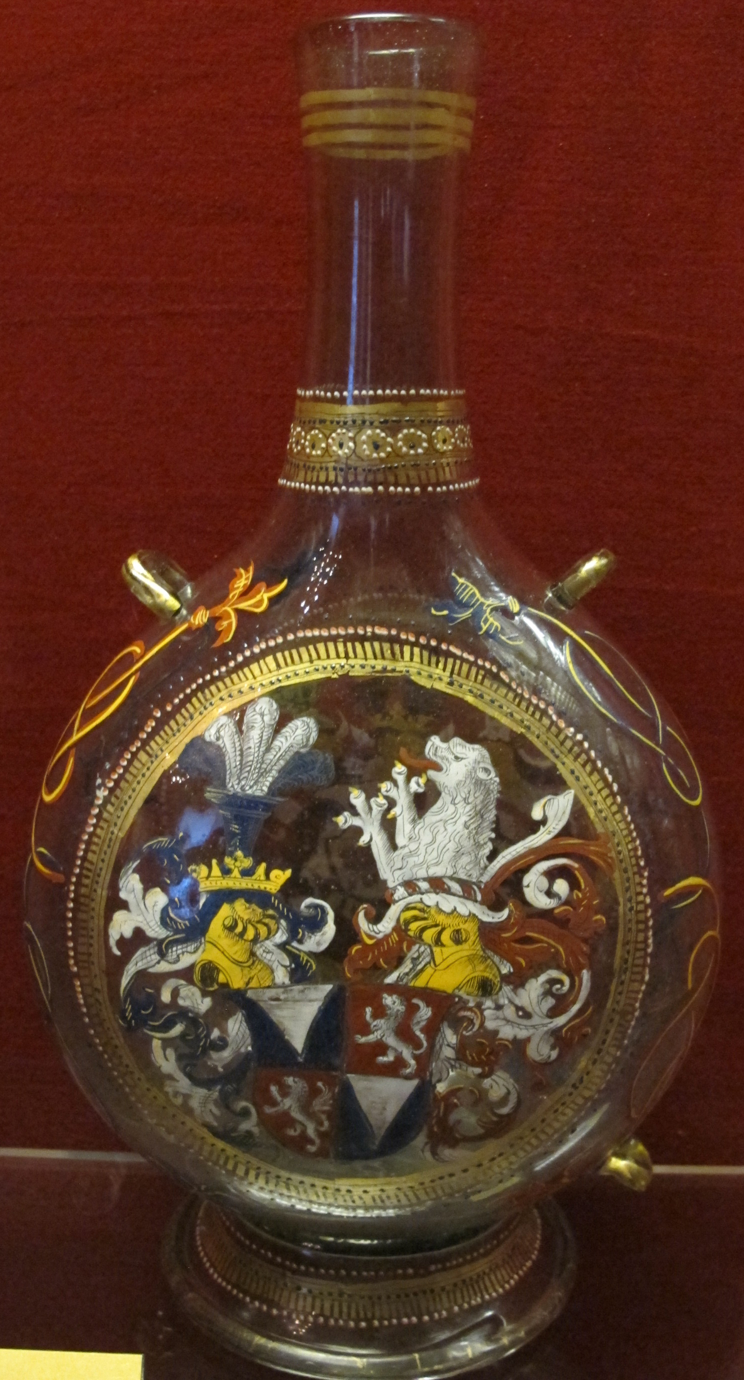 Venezia, fiasca da pellegrino, 1523-1526 ca.